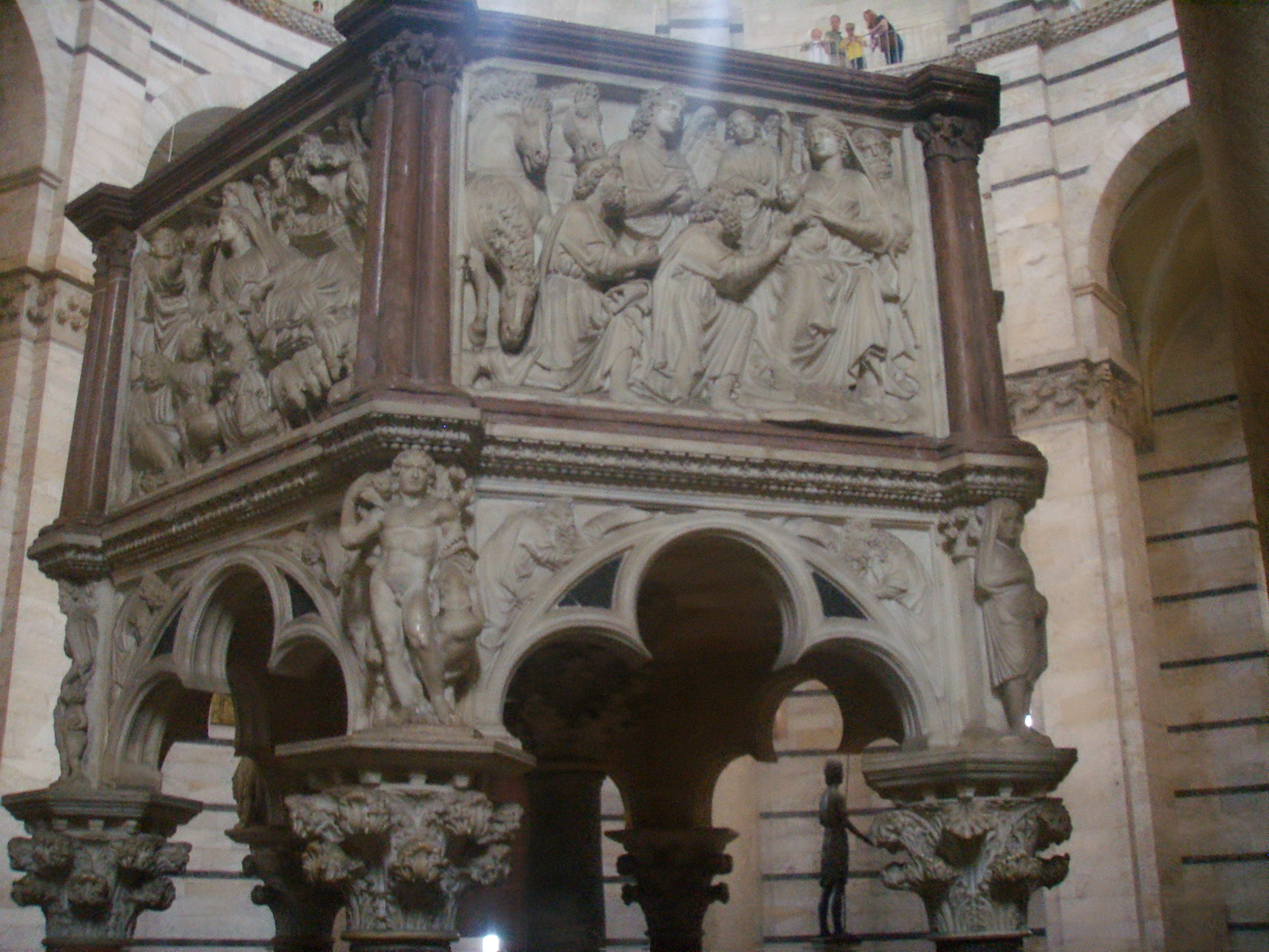 Battistero (Baptistry) pulpit by Nicola Pisano in Pisa, italy